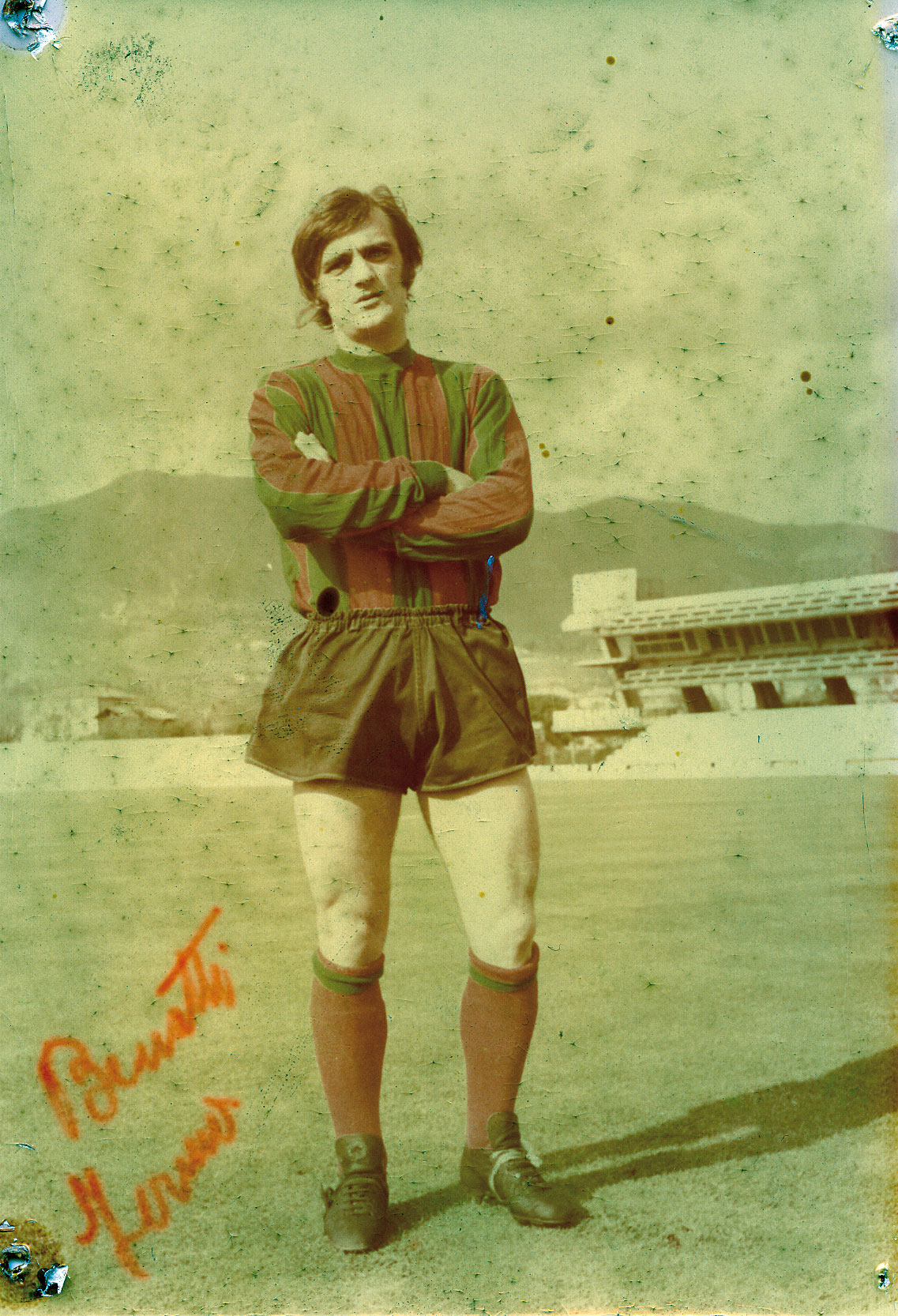 Fernando Fermo Benatti 1963